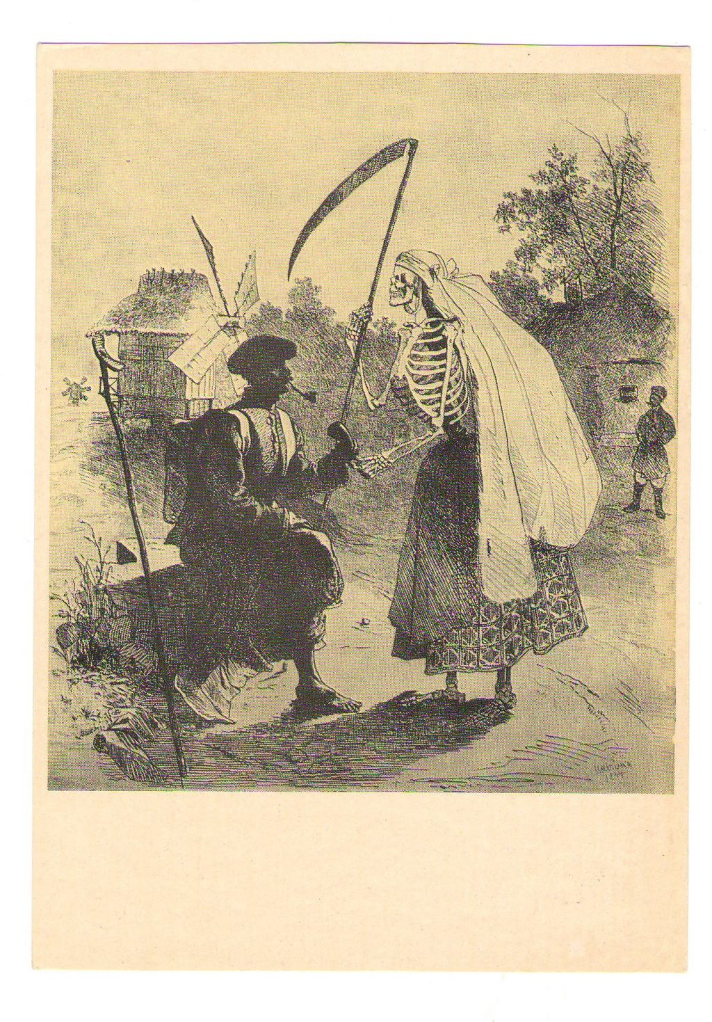 Рисунок Тараса Шевченко к украинской сказке «Солдат и смерть». 1844. Офорт. Из альбома "Живописная Украина".